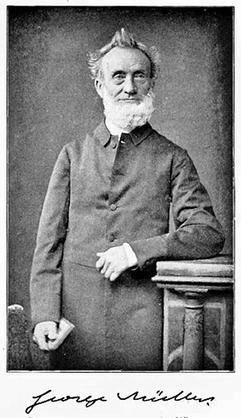 George Muller in Bristle, England